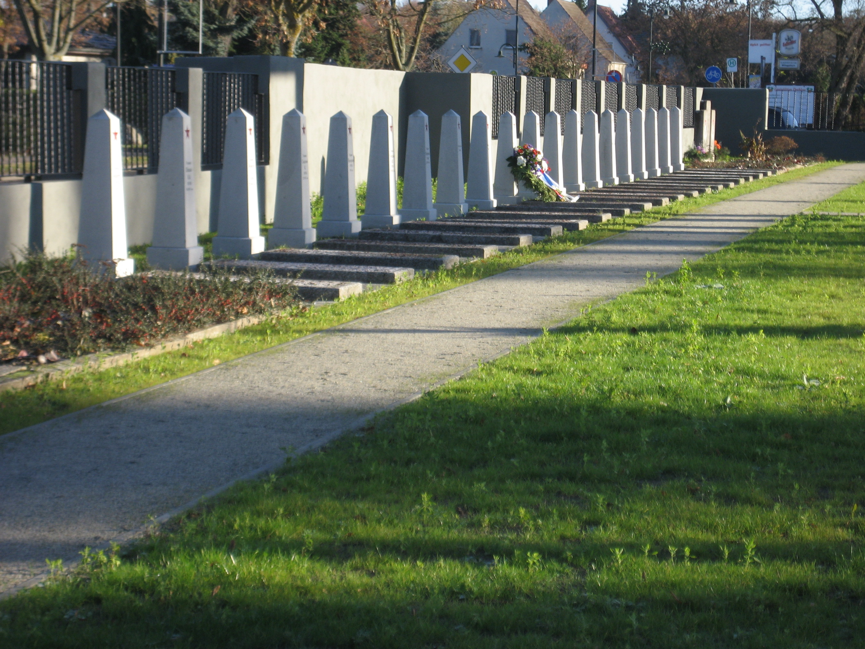 Der Sowjetische Ehrenfriedhof mit 24 Grabstellen für 43 gefallene sowjetische Soldaten der Roten Armee am Ortsausgang Löcknitz Richtung Linken/dt.-poln. Grenze nach Stettin (B 104).